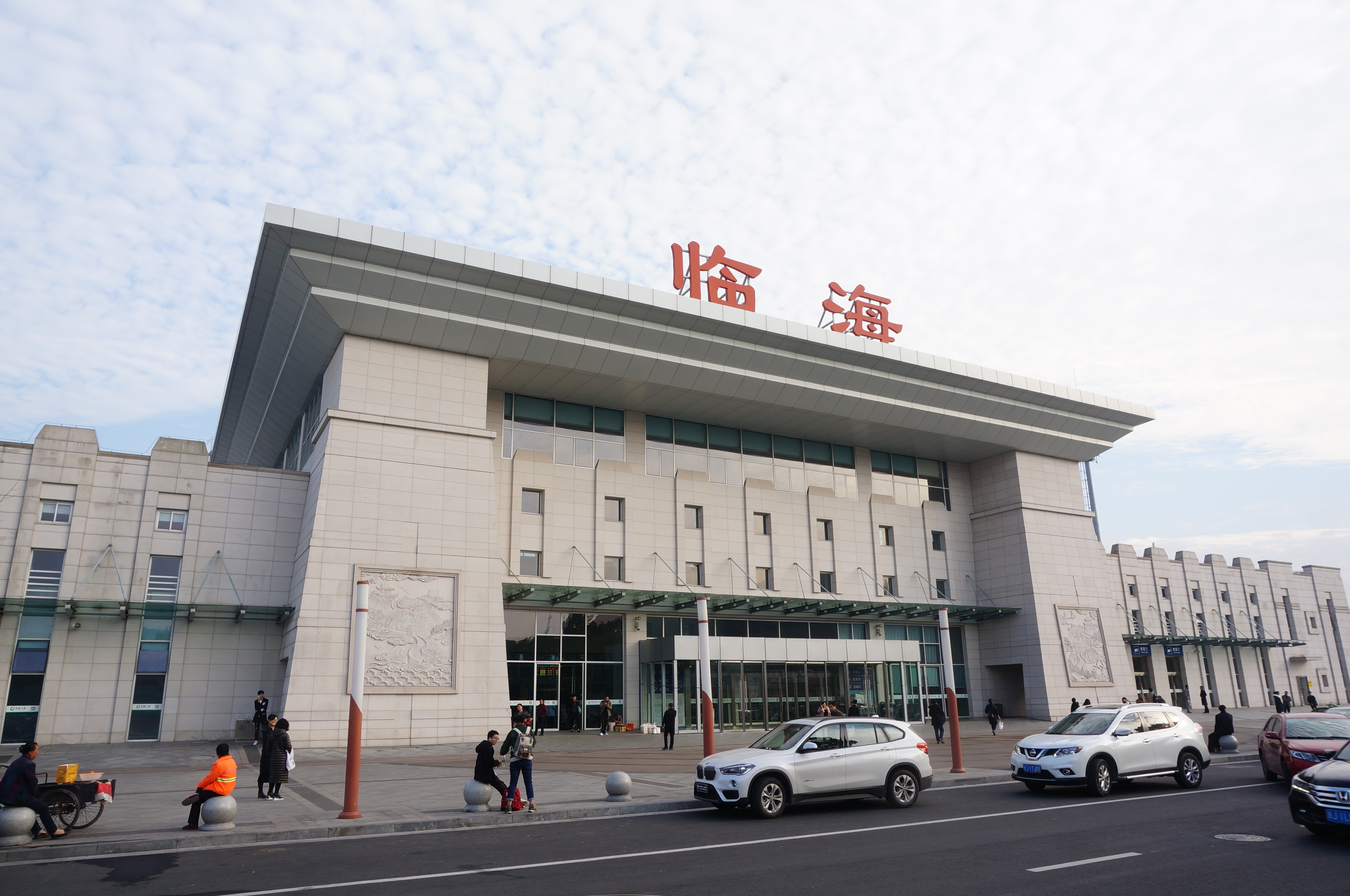 临海站，站房西面。